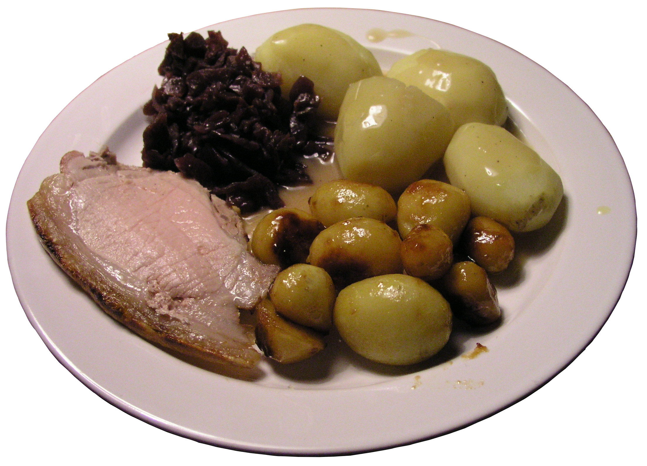 Flæskesteg med sprød svær, brunede kartofler, kogte (hvide) kartofler, rødkål og brun sovs